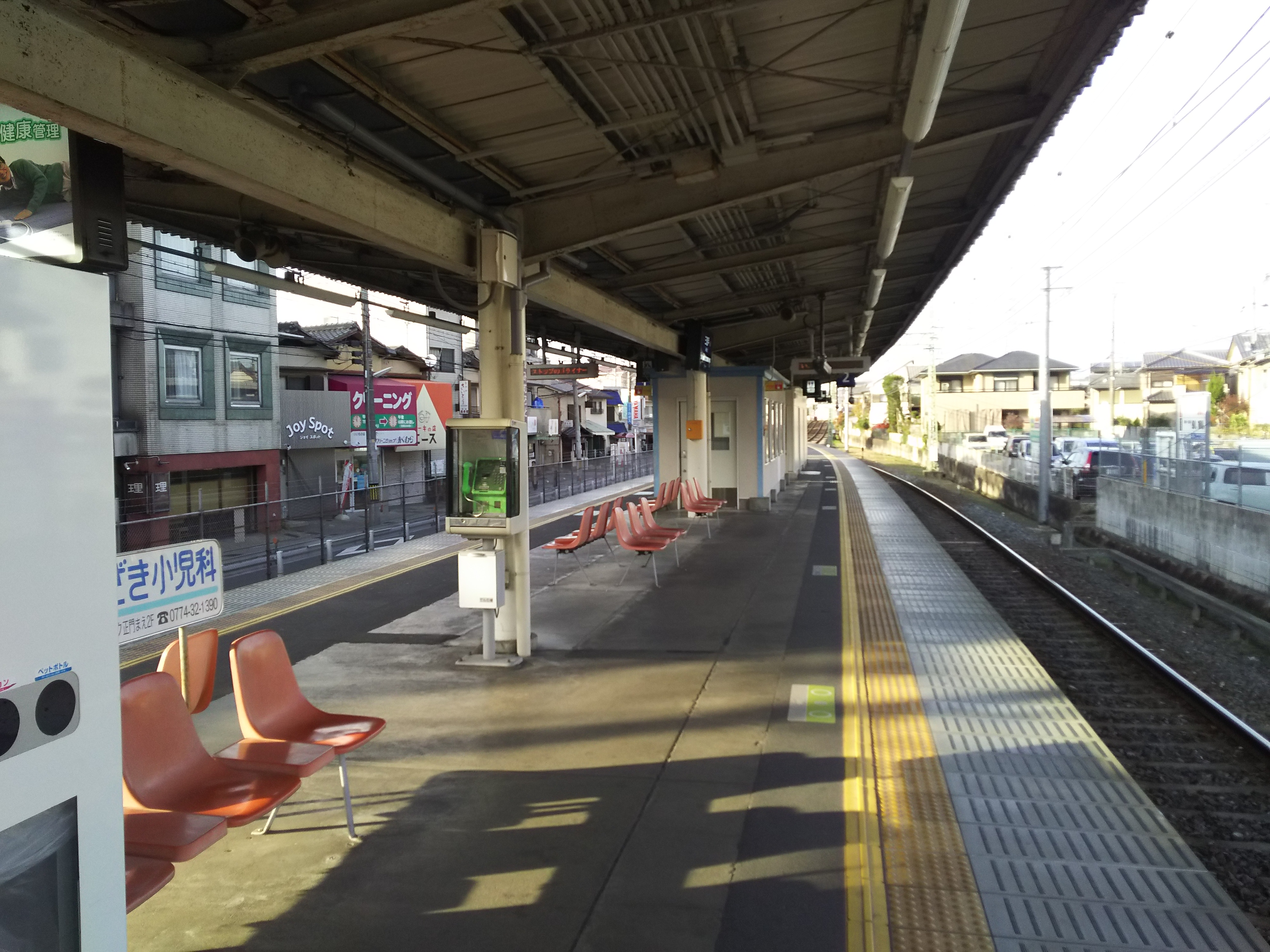 京阪宇治線三室戸駅プラットホーム（京都府宇治市）